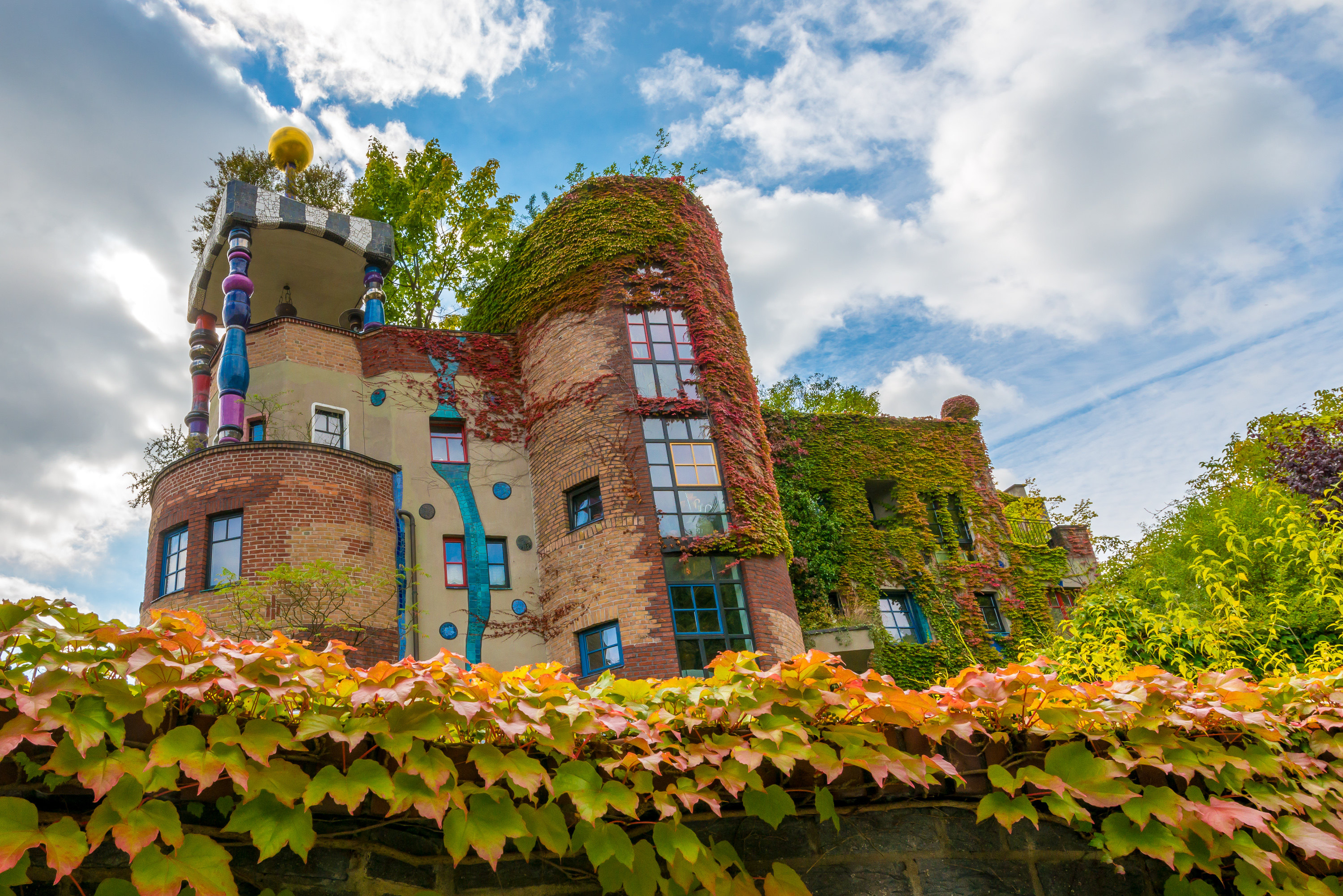 Hundertwasserhaus Bad Soden am Taunus im Herbst